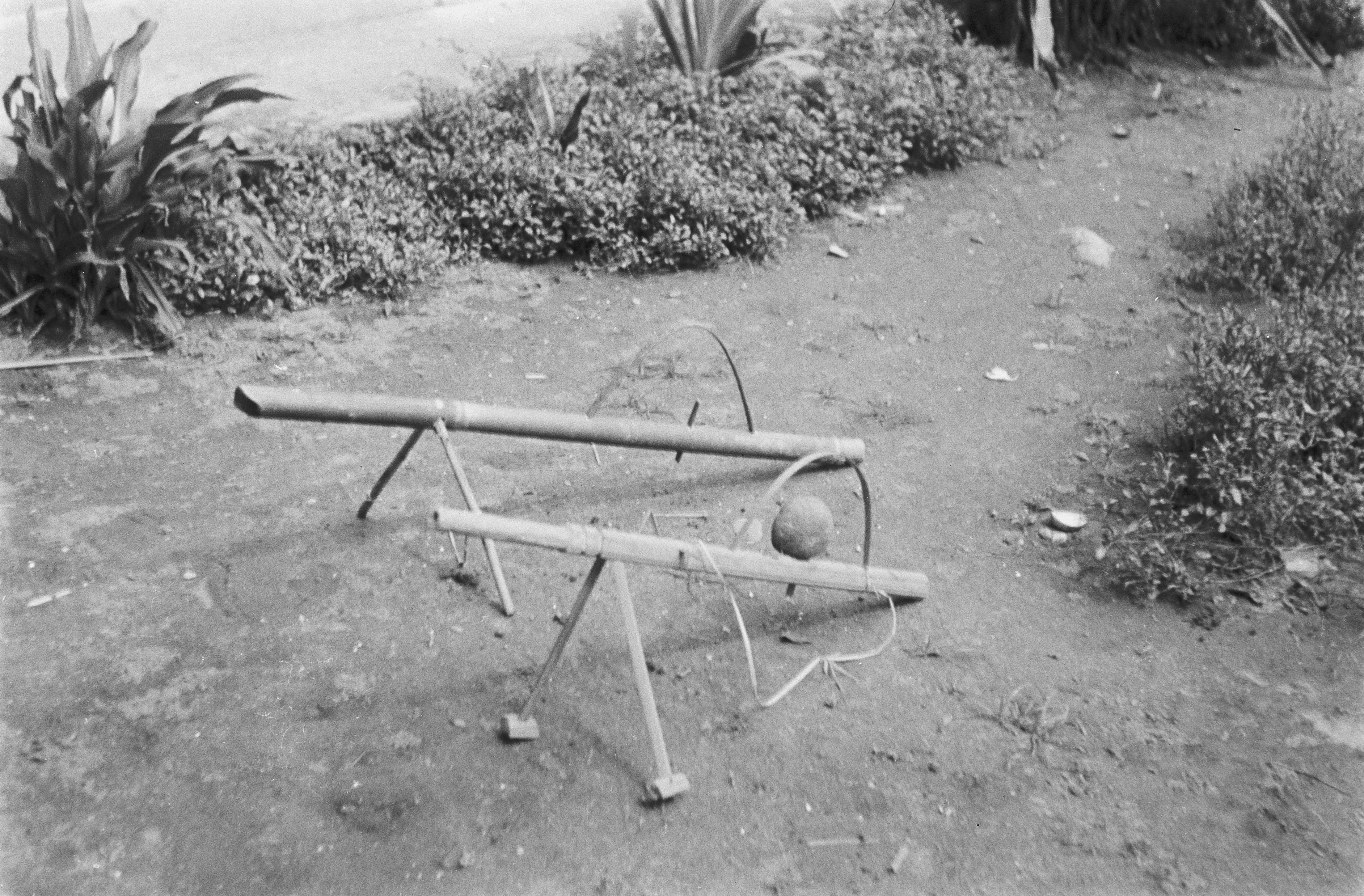 Collectie / Archief : Fotocollectie Dienst voor Legercontacten Indonesië Reportage / Serie : [DLC] Zuivering Loeboek Aloeng Beschrijving : In beslag genomen wapens. Van bamboehout vervaardigde mortieren? Datum : 10 december 1947 Locatie : Indonesië, Nederlands-Indië, Sumatra Fotograaf : Steggerda, Harry / DLC Auteursrechthebbende : Nationaal Archief Materiaalsoort : Negatief (zwart/wit) Nummer archiefinventaris : bekijk toegang 2.24.04.03 Bestanddeelnummer : 464-5-2